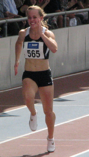 Leena Günther beim DLV WM-Testwettkampf 2011 im Stadion der MTG Mannheim.